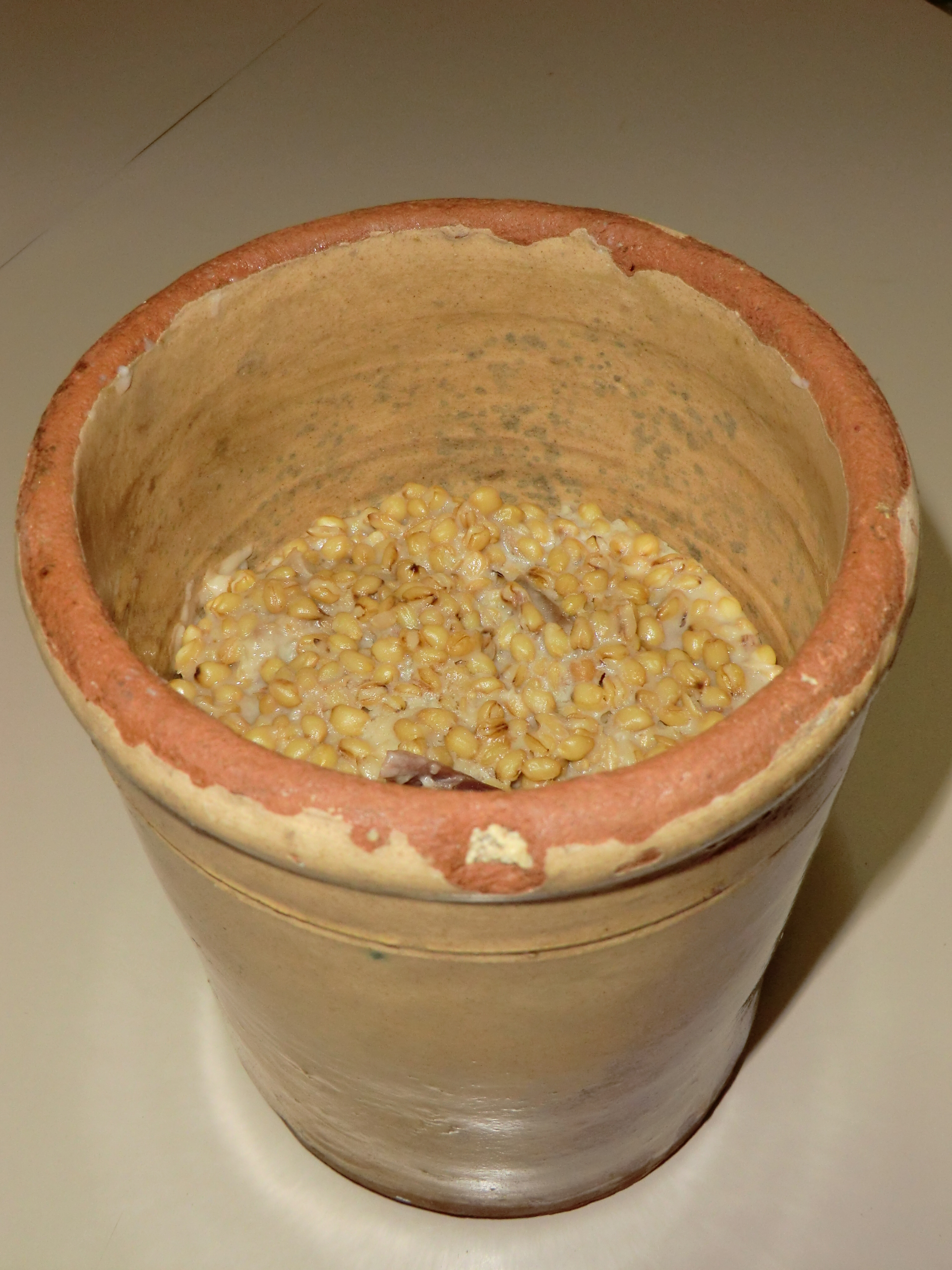 Un recipiente casalingo in uso nella cucina cosentina tradizionale, il tinìallu, in cui solitamente venivano collocati cibi la cui preparazione richiedeva una "pressatura" tramite peso (ad es. olive, pomodori secchi, melanzane...) o cibi da conservare ad es. sotto il grasso. Qui pieno di cuccìa presilana (Rovito).